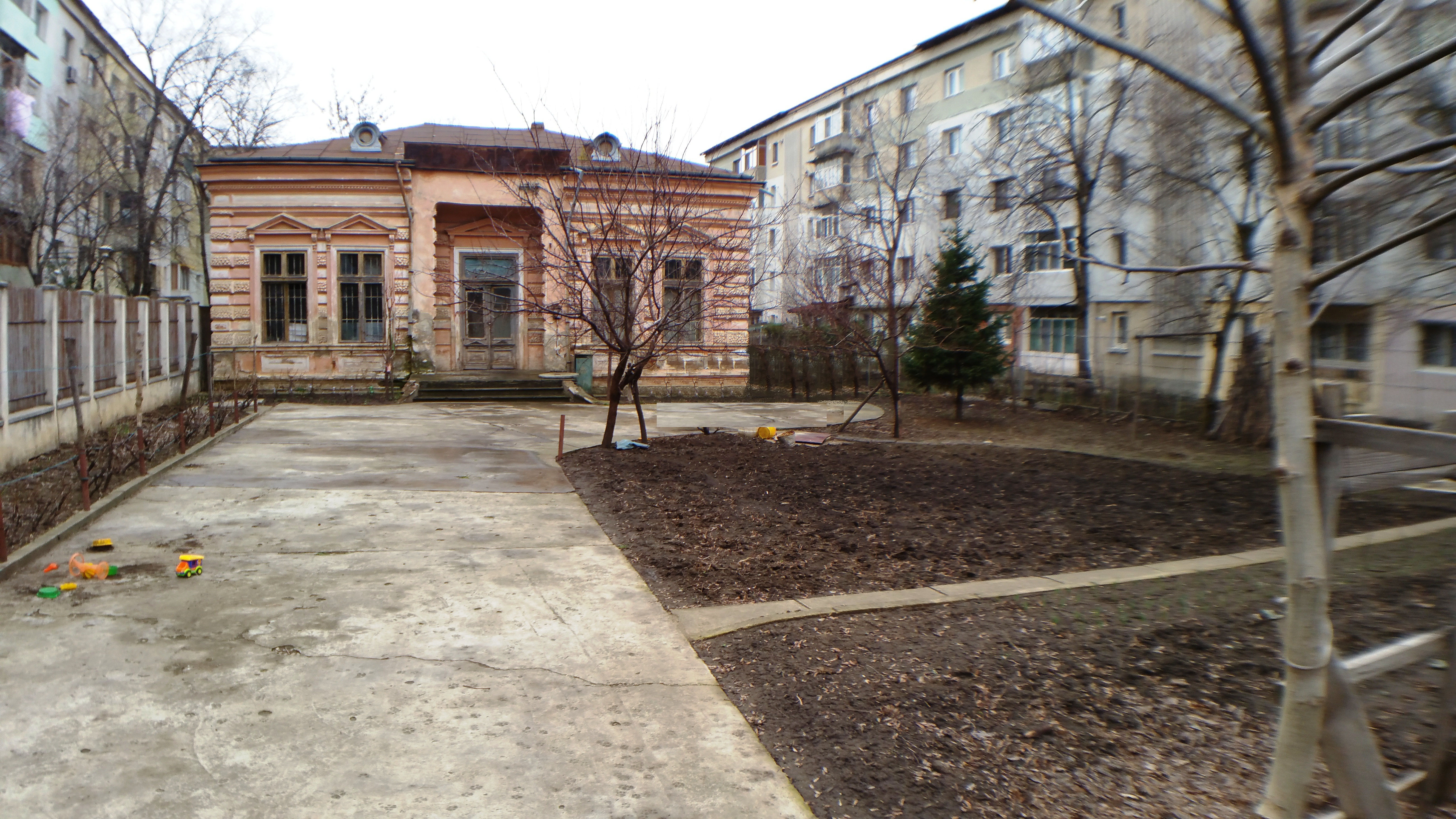 Casa Șuțu, azi Casa Chiriac